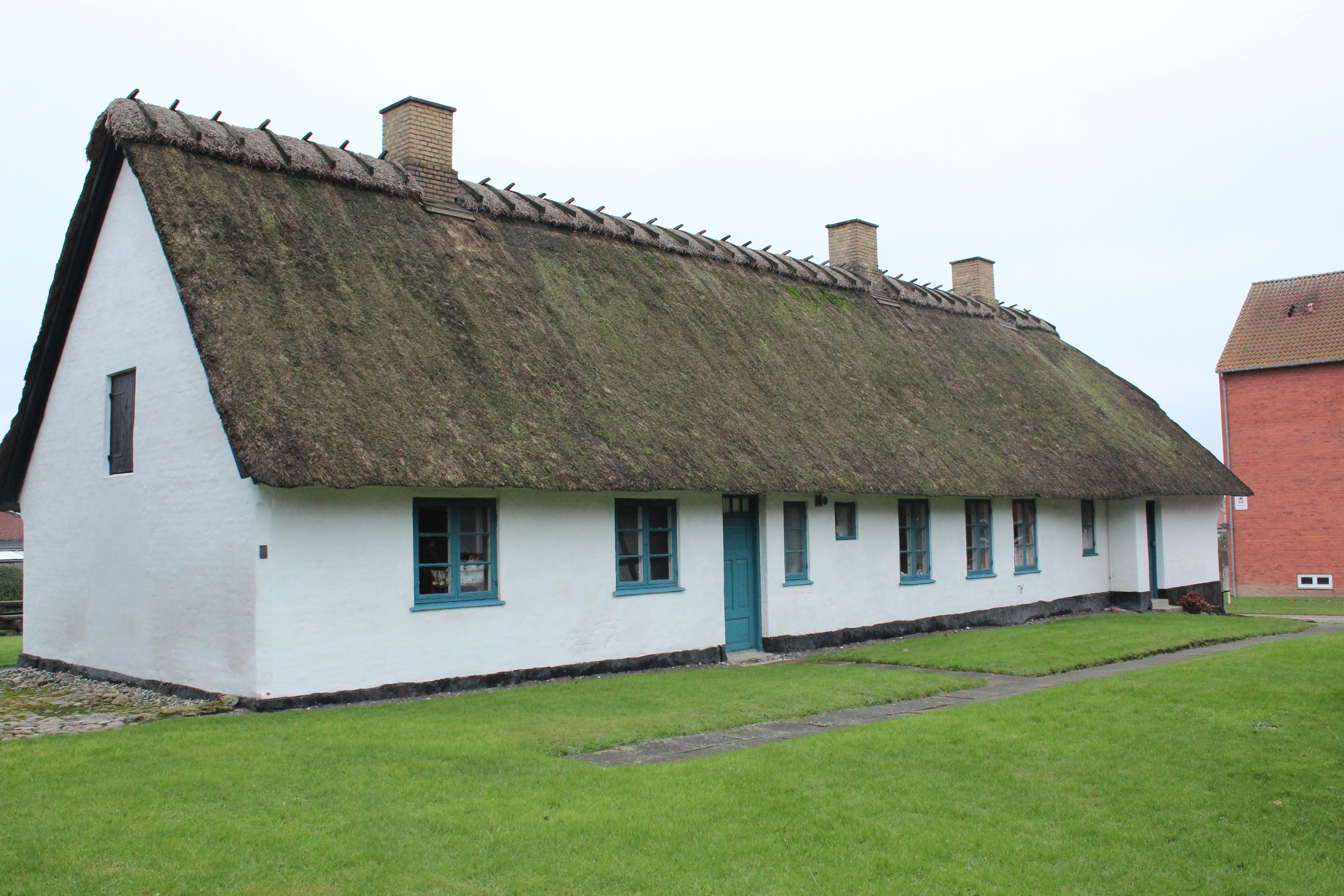 Bygningen hvor Legetøjsmuseet har udstilling.